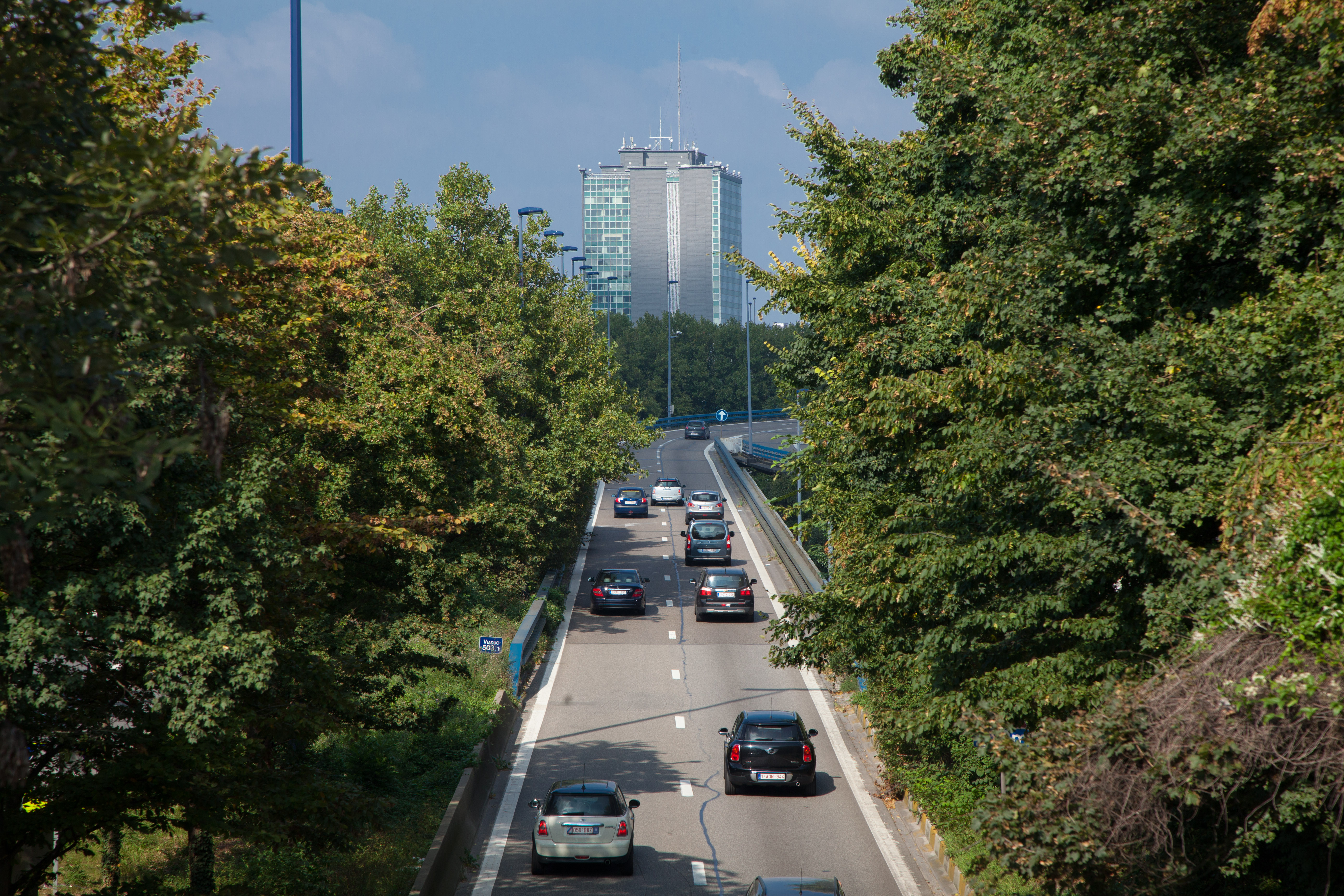 Ring de Charleroi avec la tour Albert et l'hotêl de ville en arrière plan.